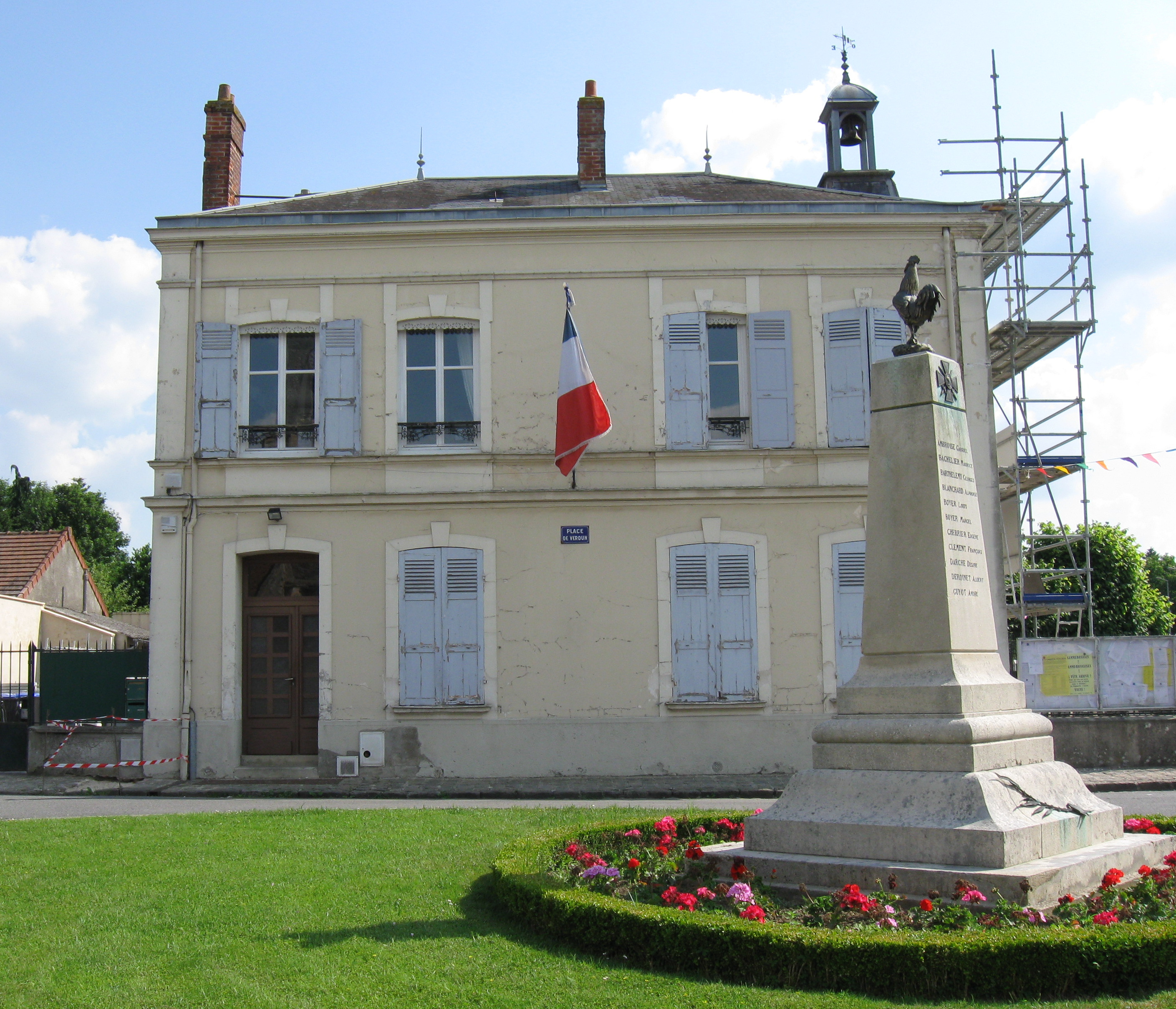 Mairie de Sammeron. (département de la Seine-et-Marne, région Île-de-France).